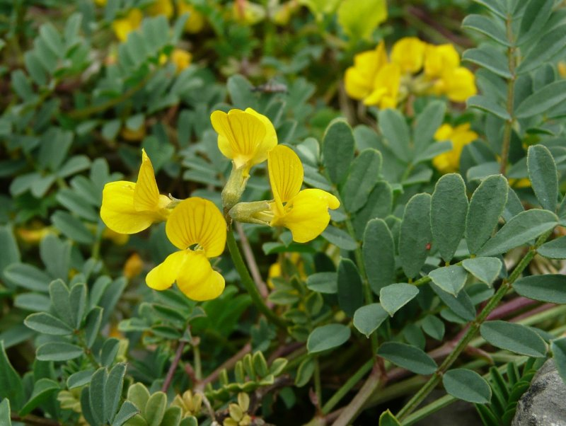 Botanischer Garten Erlangen, 2008